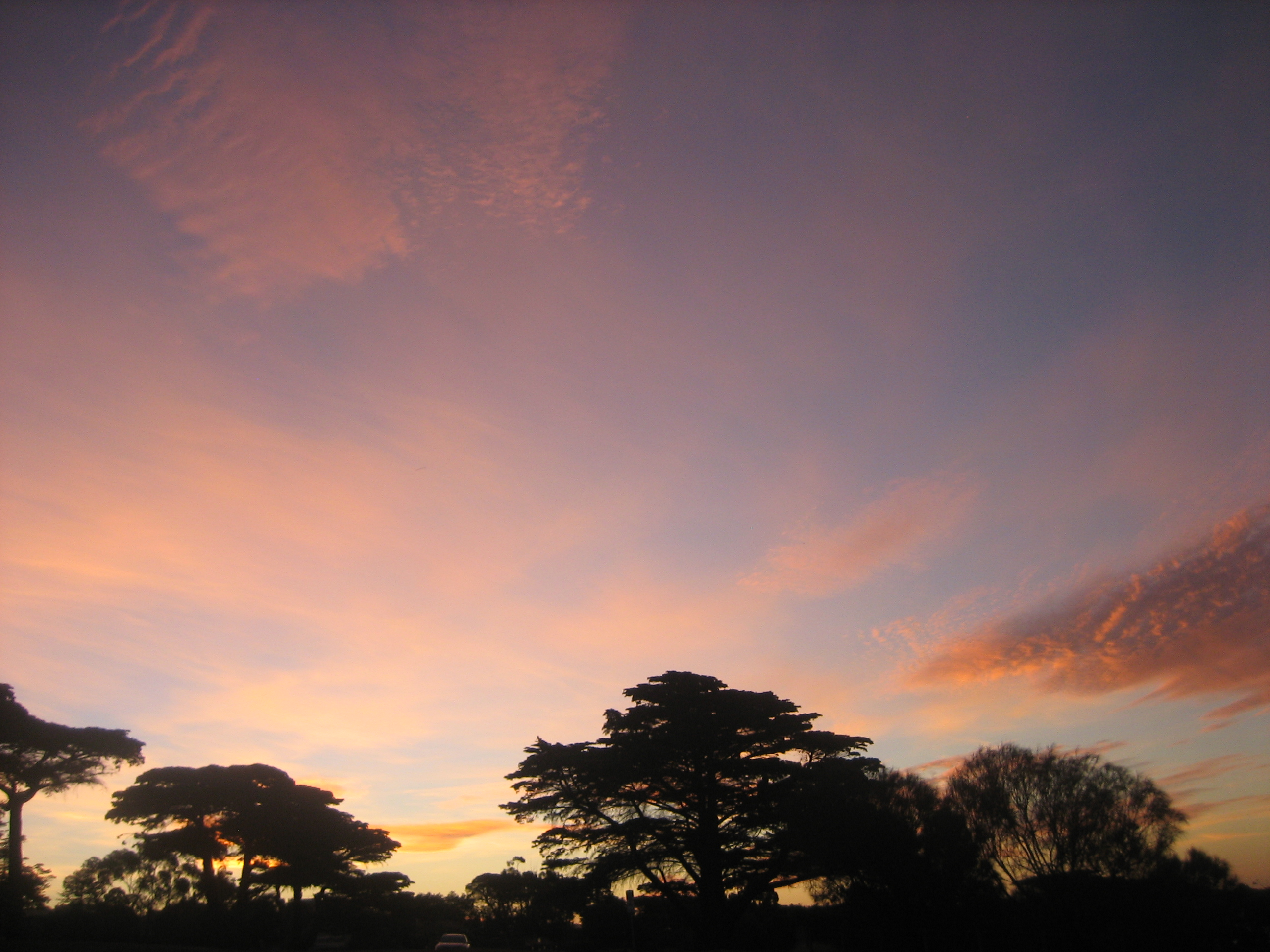 सूर्यास्त